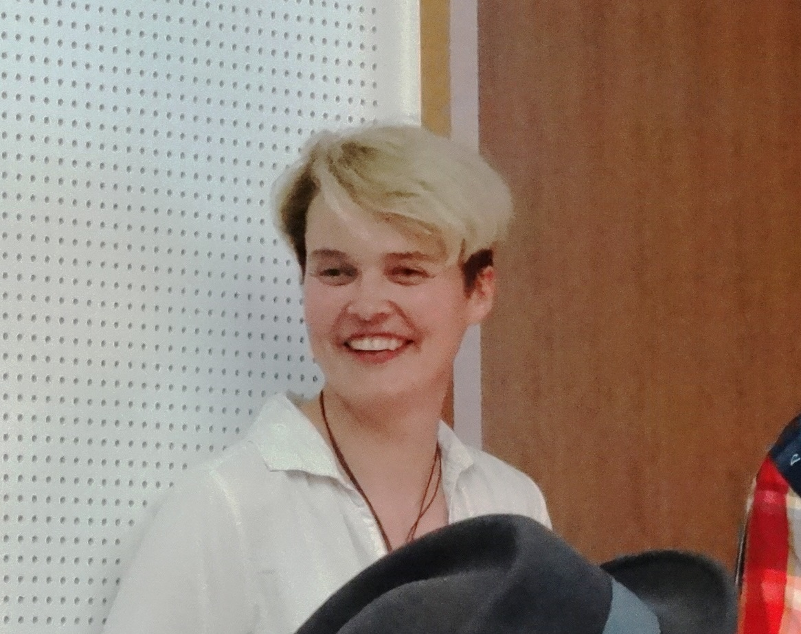 Gee Vero bei ihrer Ausstellungseröffnung "Gee Vero. The Art of Inclusion" am 21. Mai 2014, im Kleisthaus in Berlin